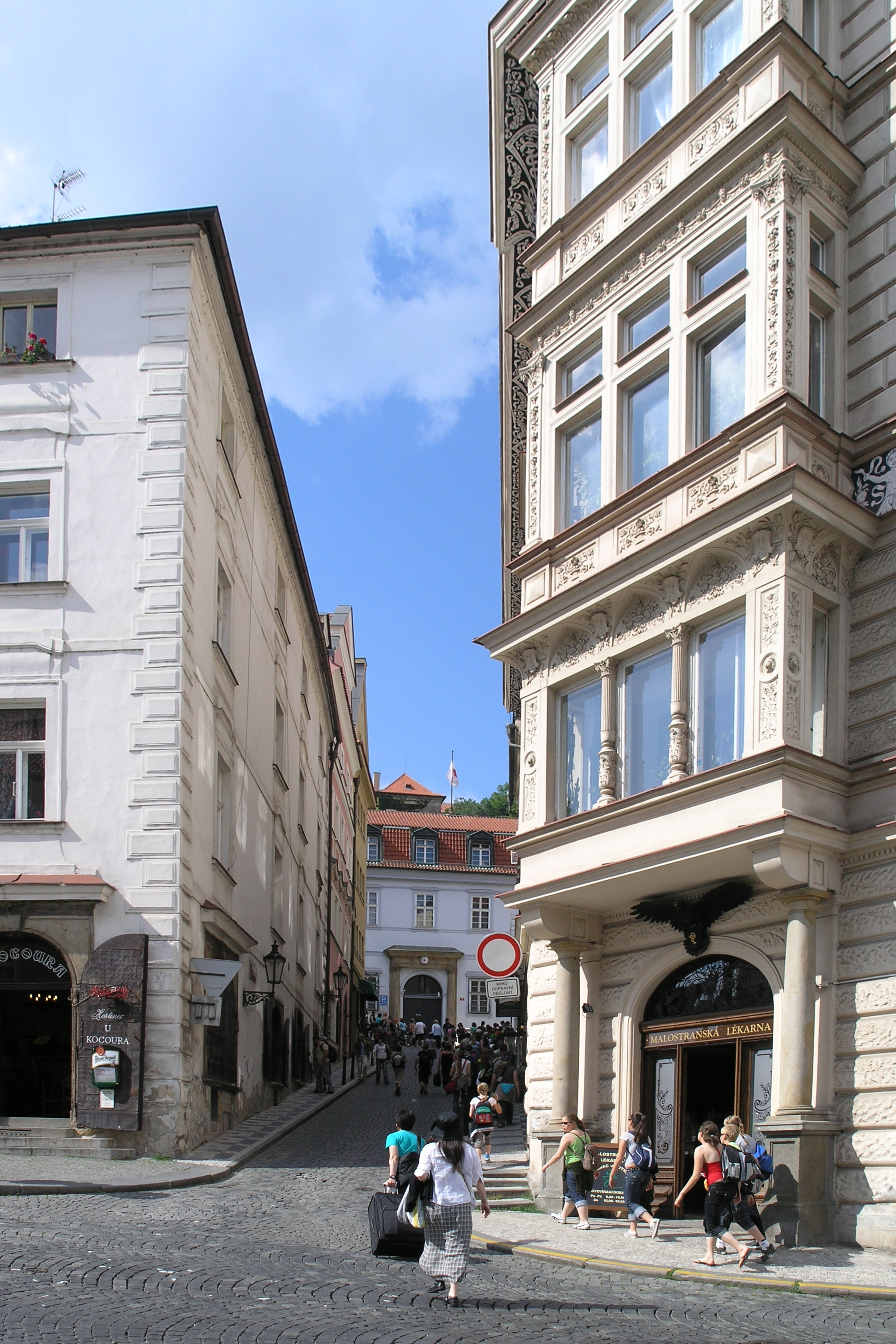 Praha, Malá Strana - ulice Zámecká